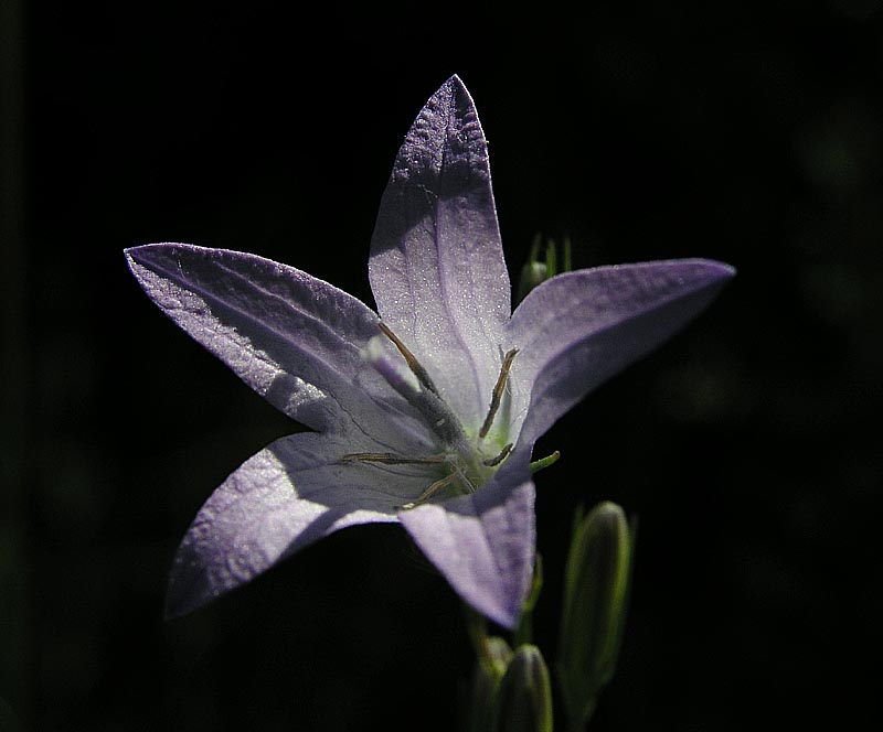 Wiesen-Glockenblume (campanula patula), aufgenommen am Hornberg in Buseck